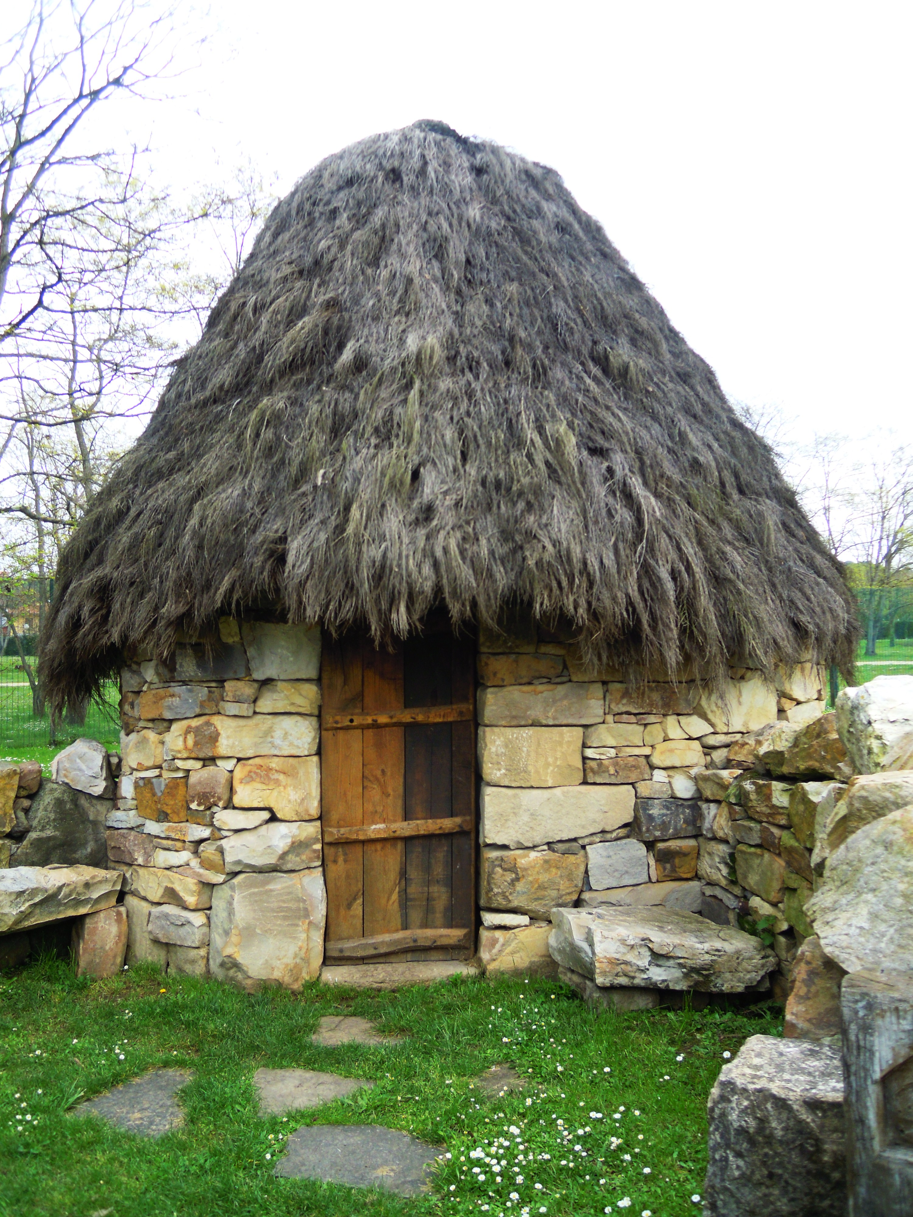 Muséu del Pueblu d'Asturies